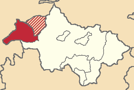 Mapa localizacor del cantón en Cañar, Ecuador